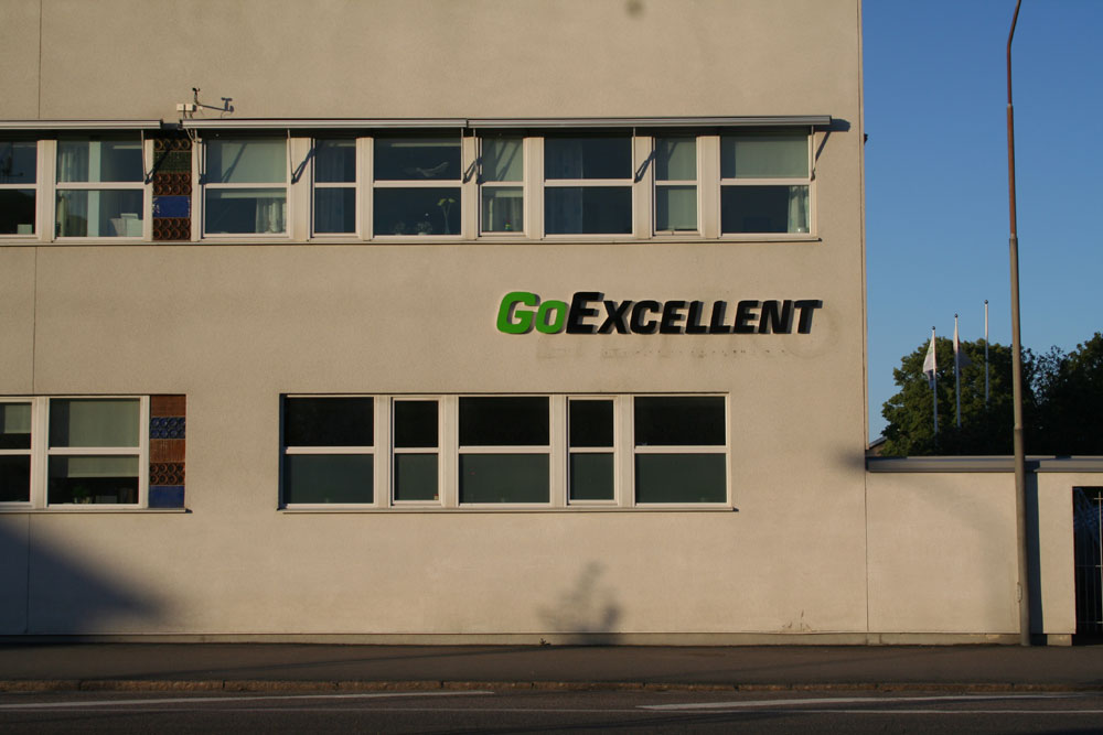 GoExcellents kontor i Kalmar